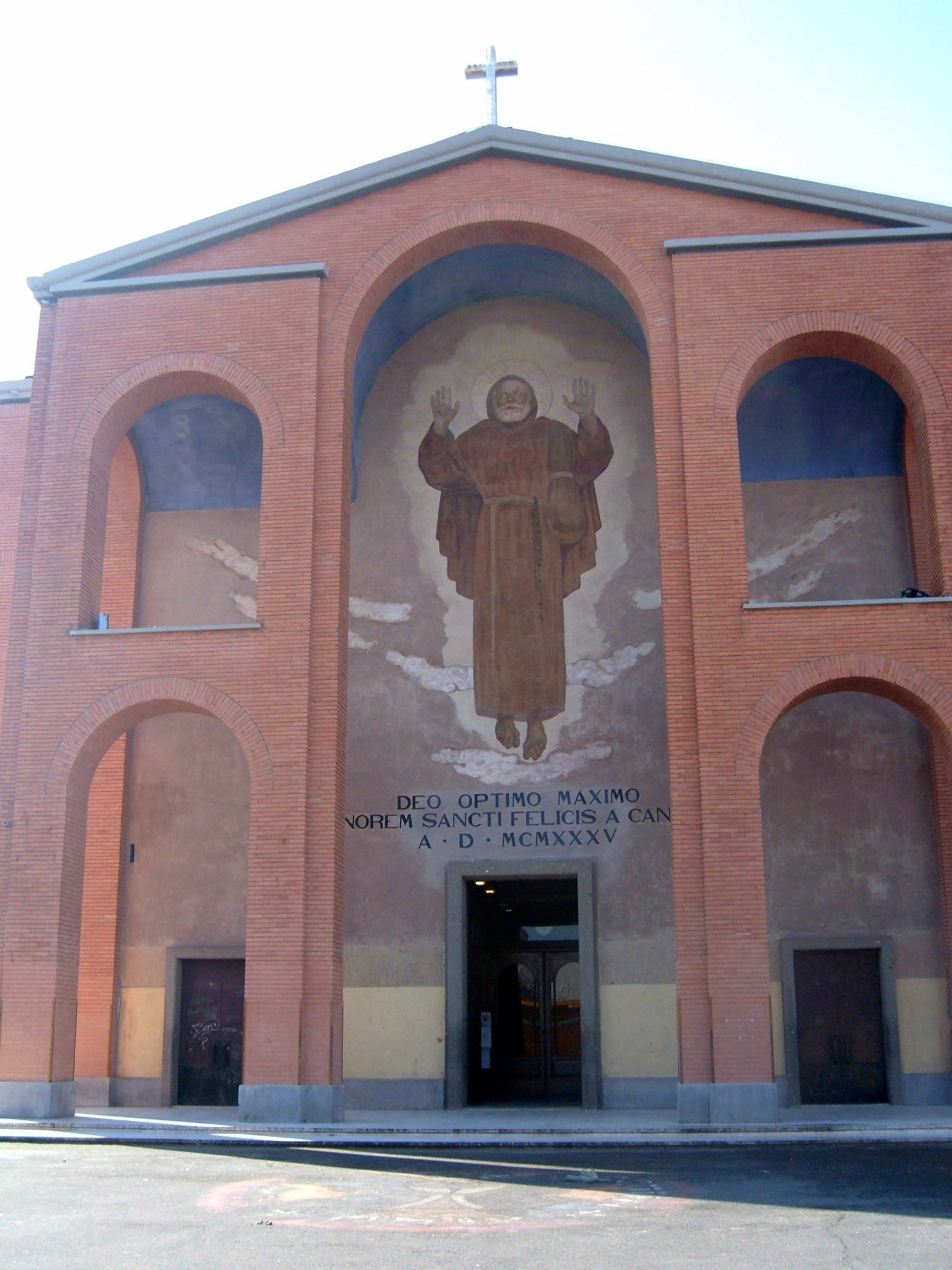 Chiesa di San Felice da Cantalice, a Roma, nel quartiere Prenestino-Centocelle.